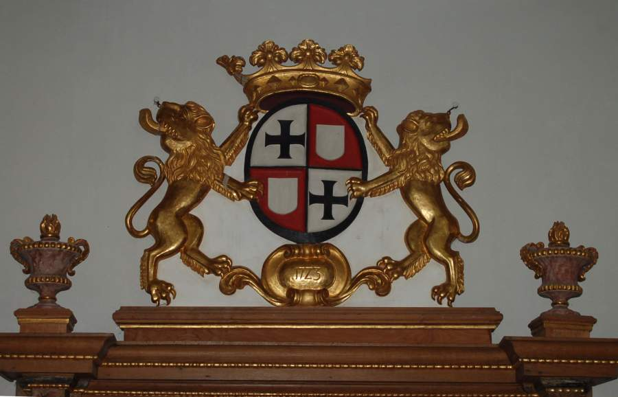 Wappen in der St. Stephanuskirche, Grevenbroich-Elsen.